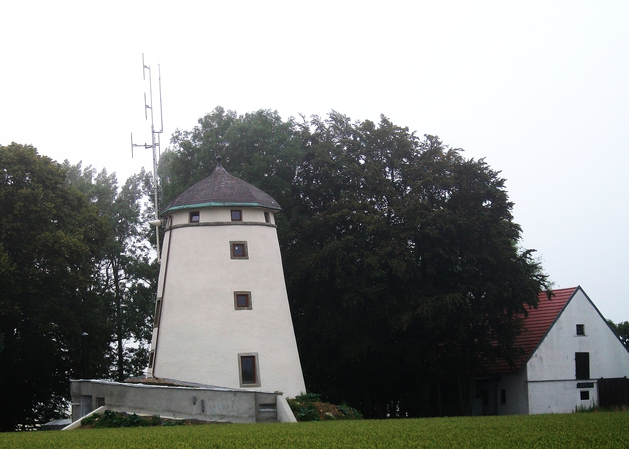 Alte Mühle (1856), Spitze Warte, höchsten Punkt des Haarstrangs, Rüthen (Germany)